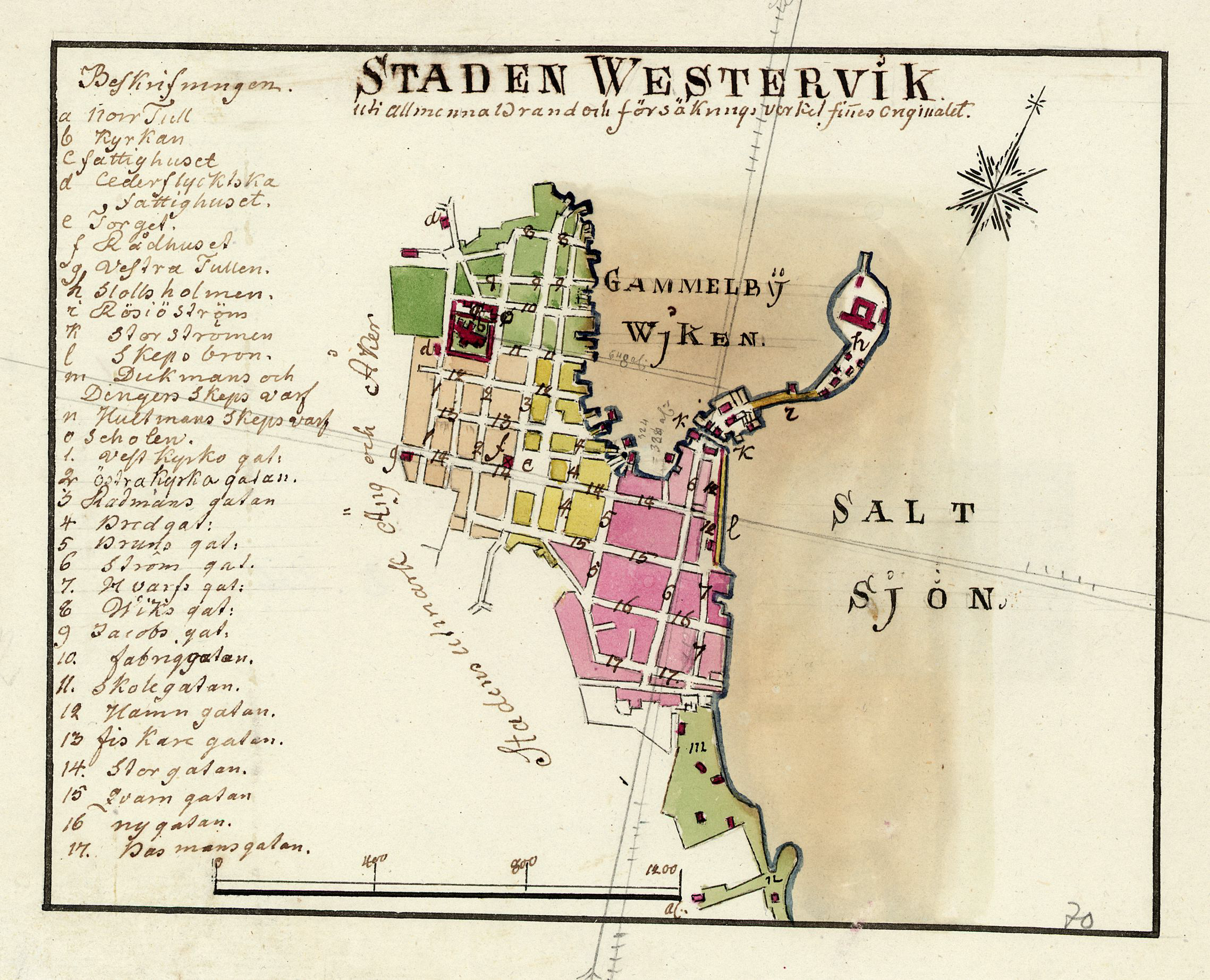 Karta över Västervik från ca: år 1800 av Fredrik Adolf Wiblingen.